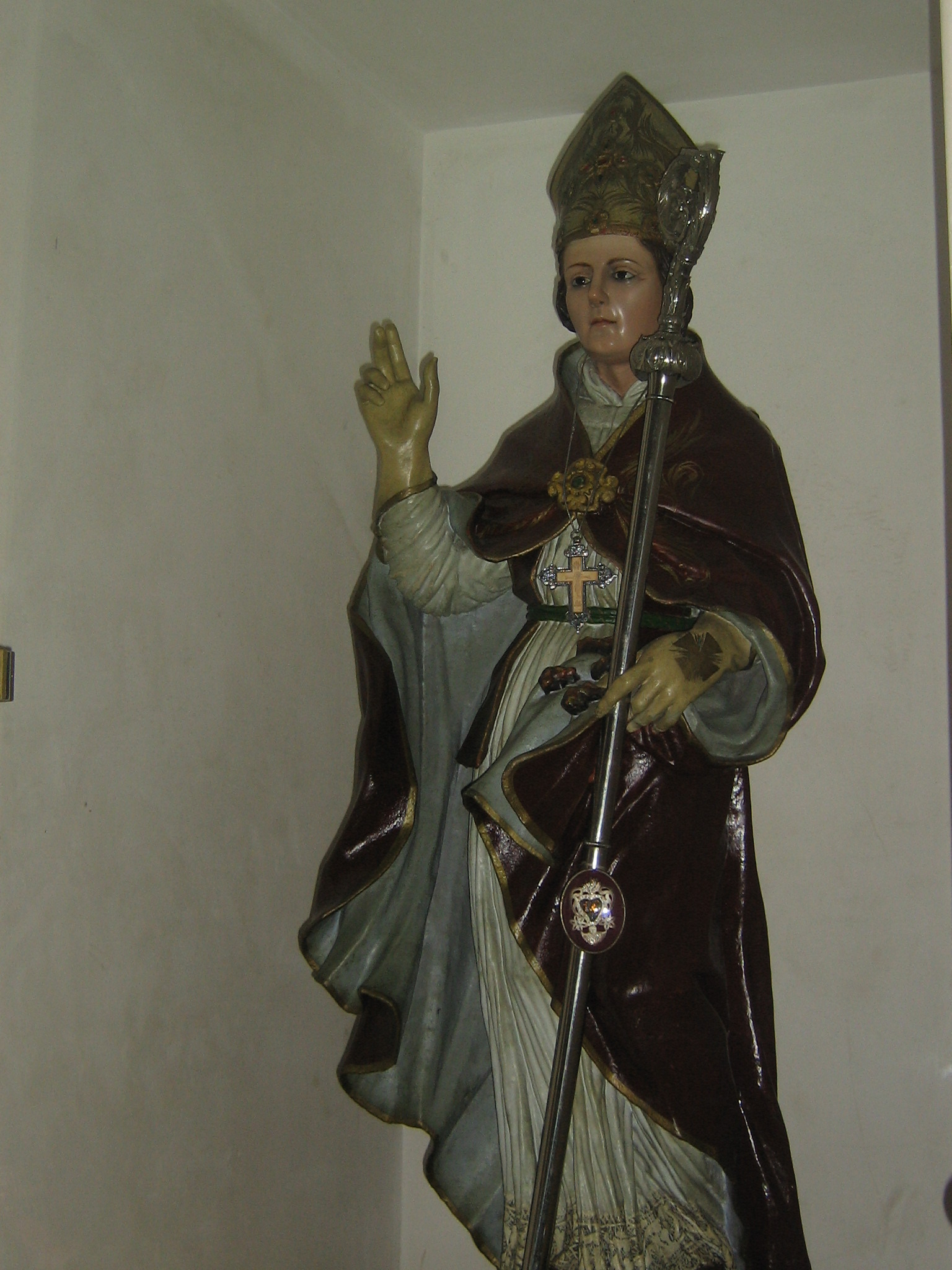 Statua di San Brizio Calimera